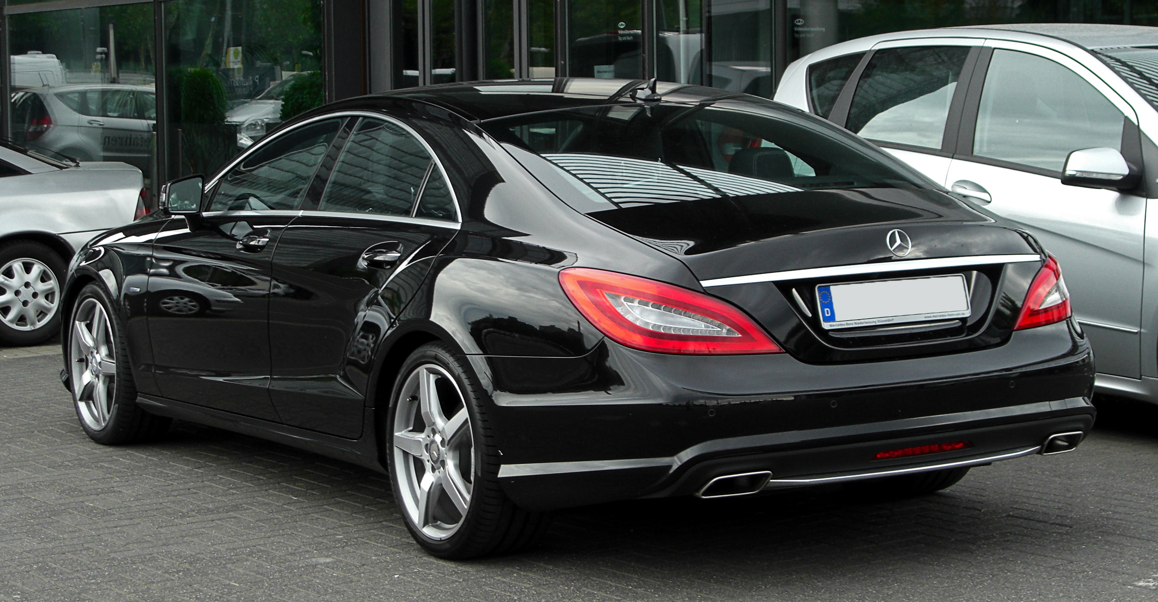 Mercedes-Benz CLS 500 BlueEFFICIENCY Sport-Paket AMG (C 218)